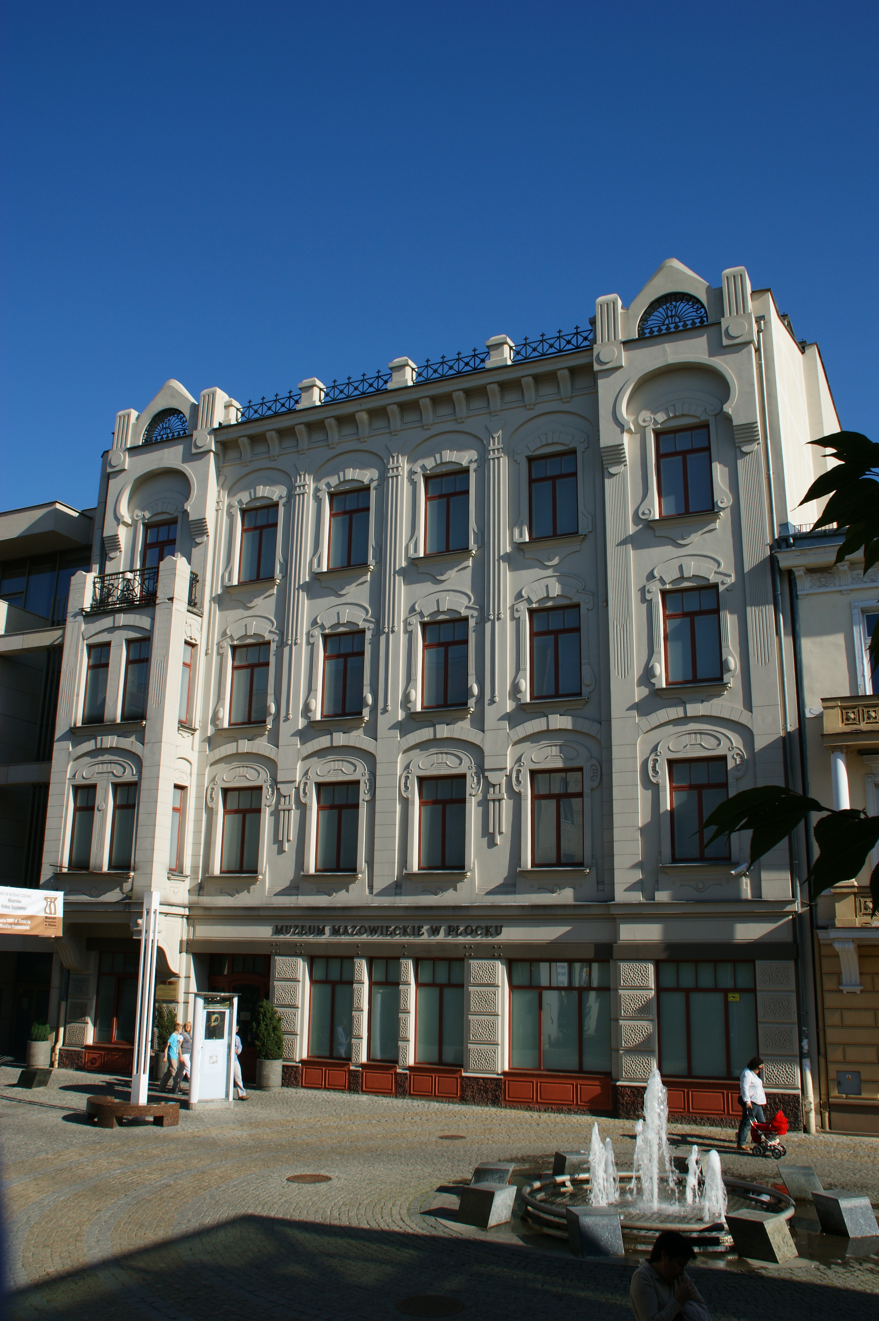 Płock, ul. Tumska 8 - dom, kamienica secesyjna, mur., 1915-1918, ob. Muzeum Mazowieckie (zabytek nr rejestr. 553)